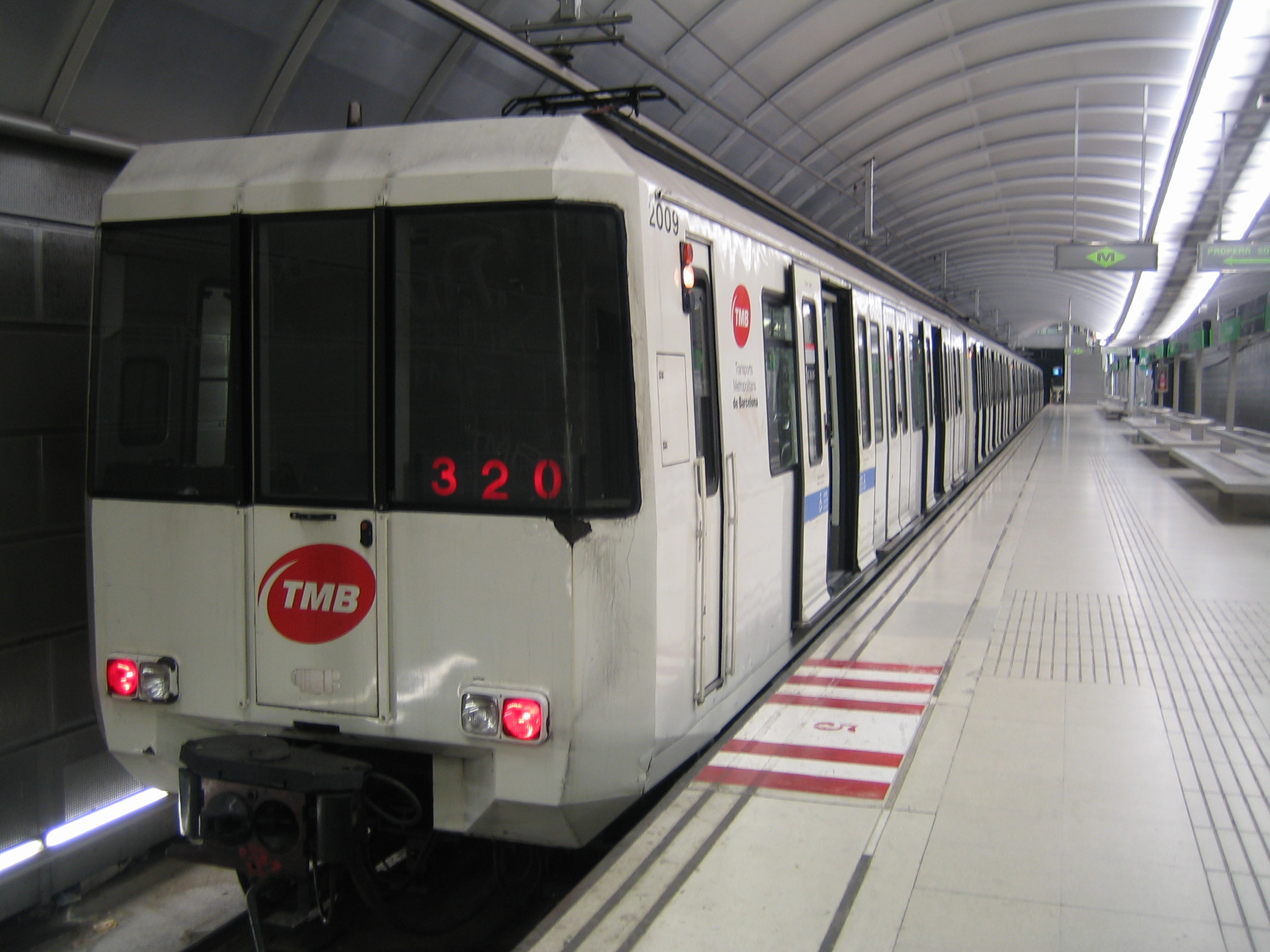 Foto hecha por mí desde la estación de Canyelles en horizontal, el martes 28 de Febrero del 2006 a las 17:46 de la tarde. Con la cámara CANON ixus 40